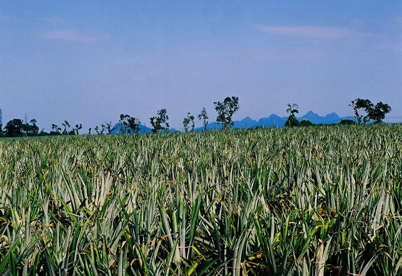 Nông trường dứa Đồng Giao - Công ty thực phẩm xuất khẩu Đồng Giao - thành phố Tam Điệp - Ninh Bình